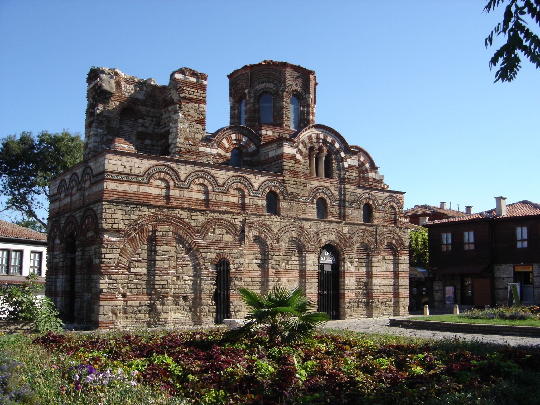 Église du Christ Pantocrator - Nessebar